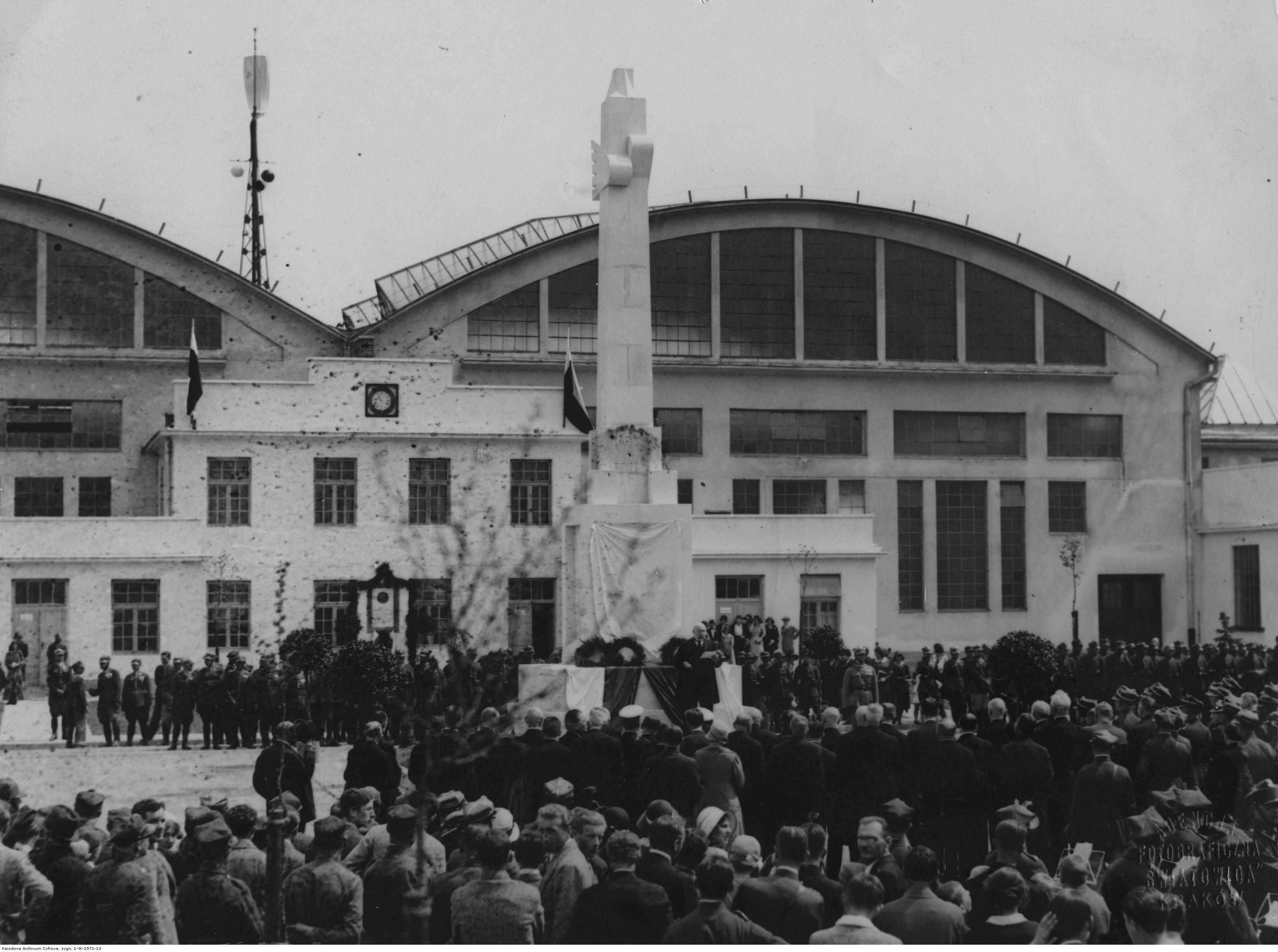 Święto 2 pułku lotniczego w Krakowie. Odsłonięcie pomnika poległych lotników - przemawia prezydent Krakowa Karol Rolle; maj 1931 r. Koncern Ilustrowany Kurier Codzienny - Archiwum Ilustracji. Sygnatura: 1-W-1571-13